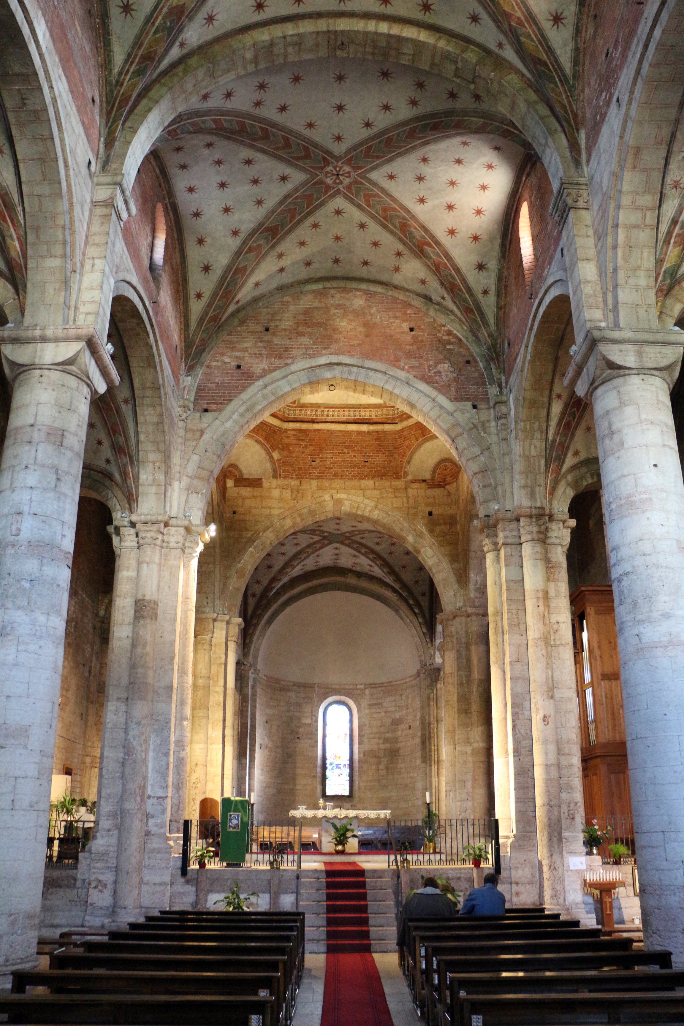 Tempio Civico San Lorenzo This is a photo of a monument which is part of cultural heritage of Italy.